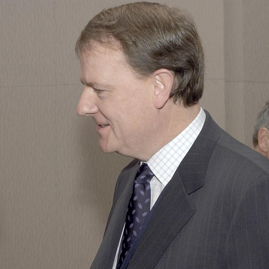 Peter Costello